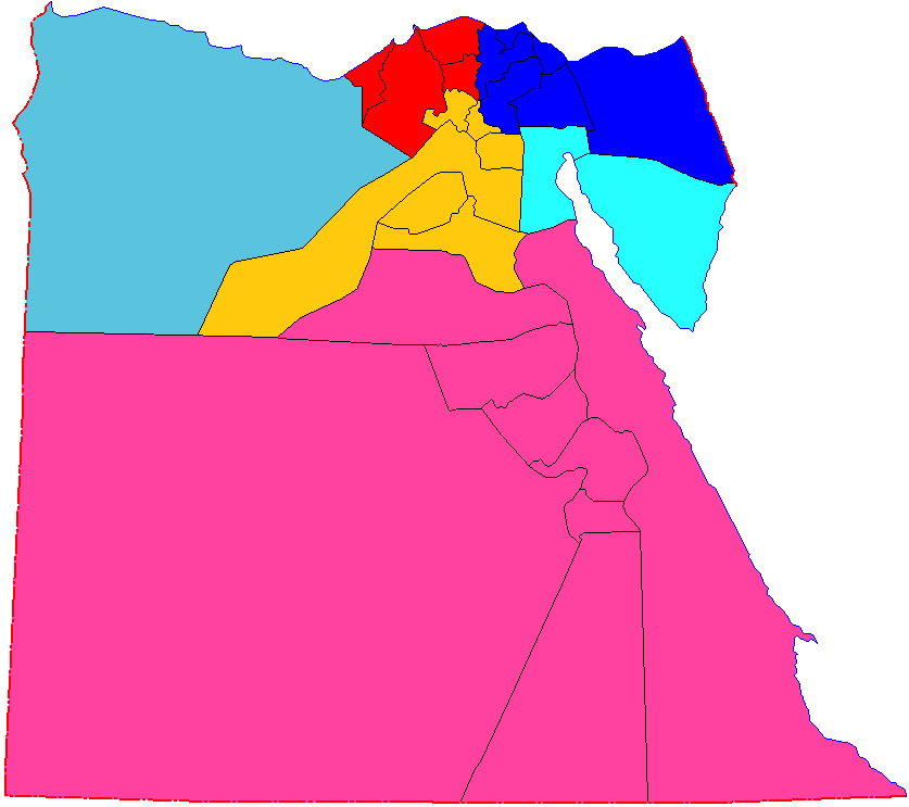 النطاقات الجغرافية للجيوش والمناطق العسكرية المصرية المنطقة الغربية العسكرية المنطقة الشمالية العسكرية المنطقة الجنوبية العسكرية المنطقة المركزية العسكرية الجيش الثاني الميداني الجيش الثالث الميداني